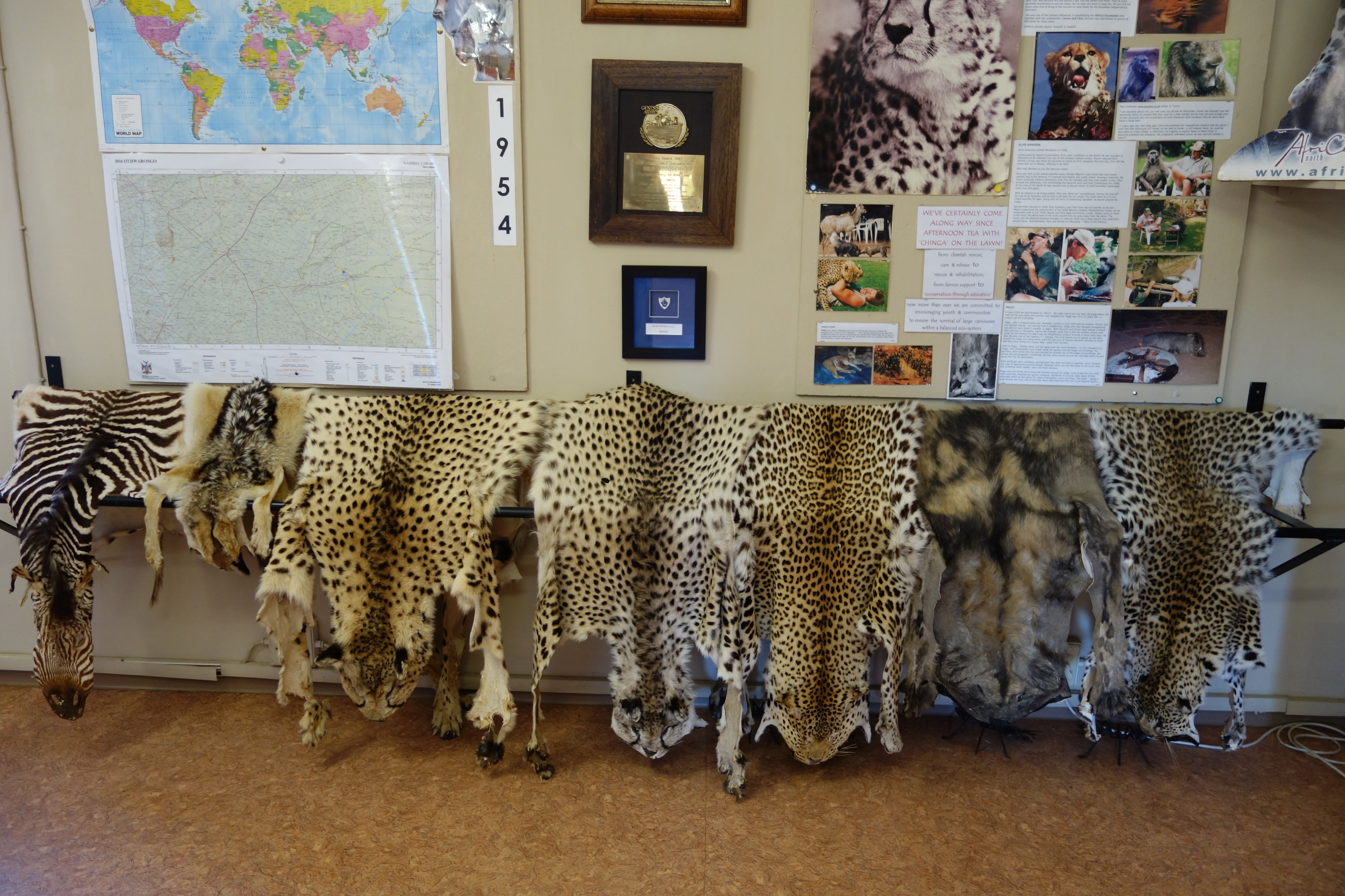 Namibia, Otjiwarongo, AfriCat-Stiftung. Von links: Zebrafell, Schabrakenschakalfell, 2 Gepardfelle, Leopardfell, Afrikanisches Wildhundfell (Wilddog), Leopardfell.